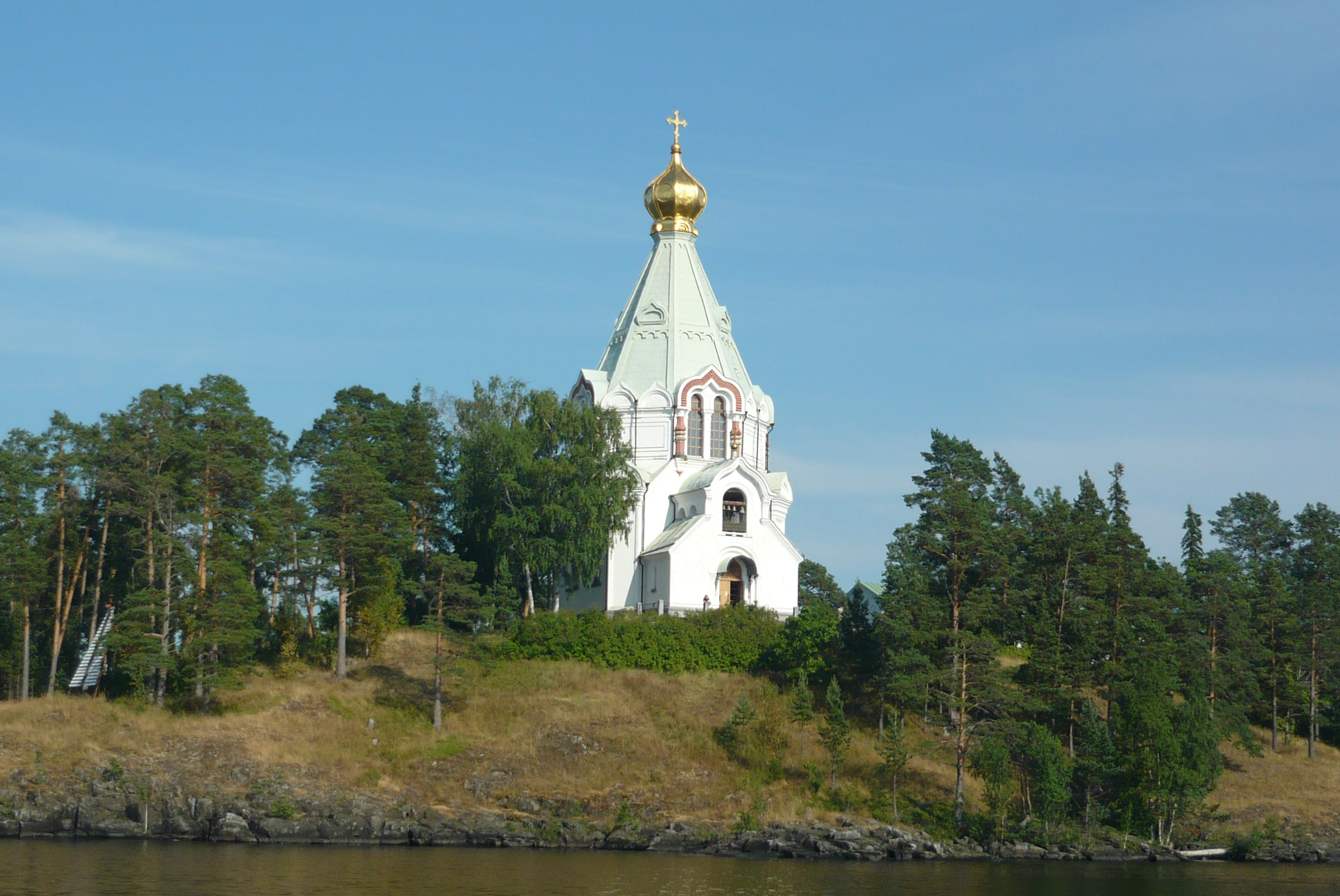 Церковь Николая Чудотворца, 1853, Никольский скит